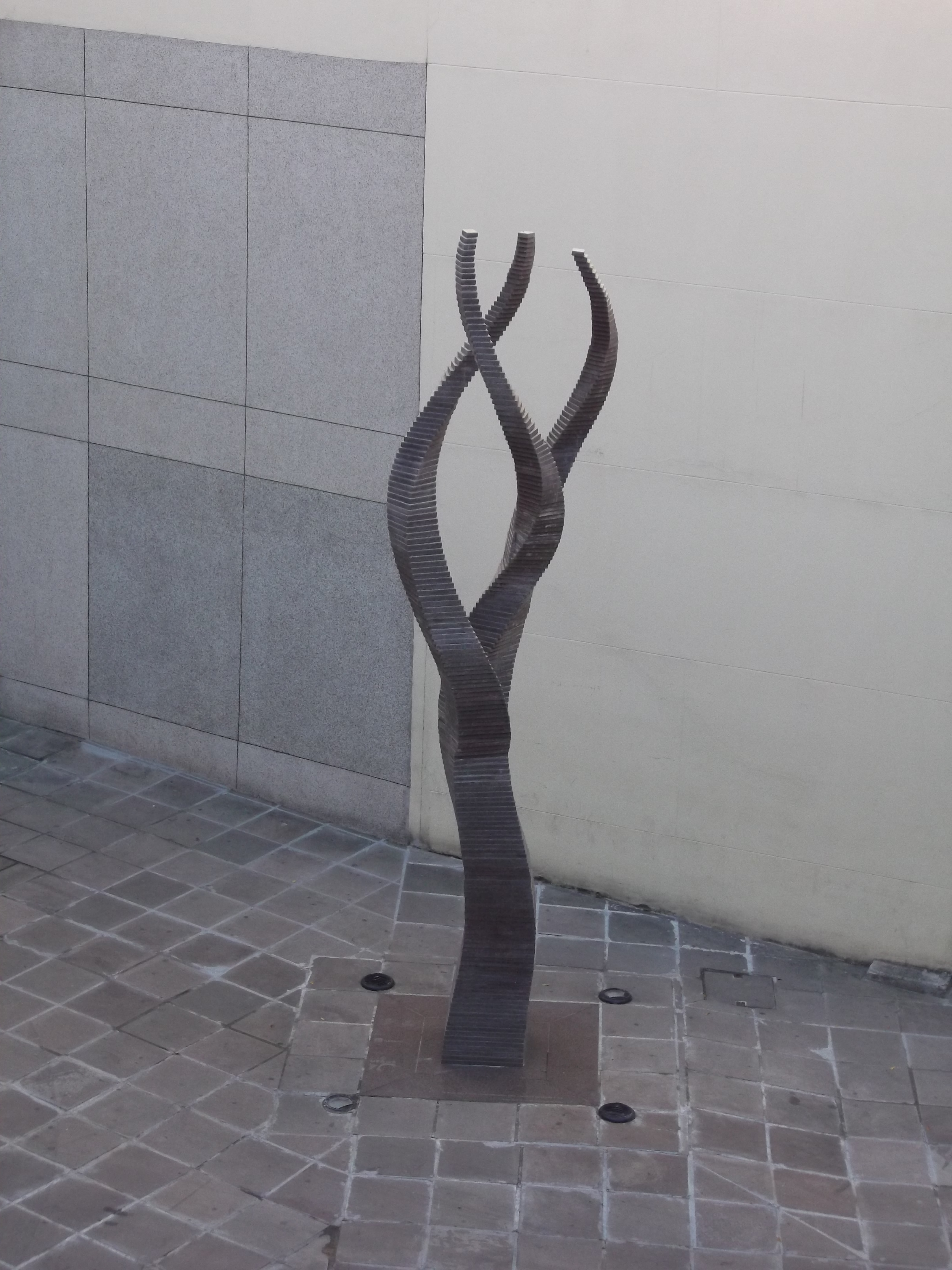 Memorial 70 anos da UFRGS